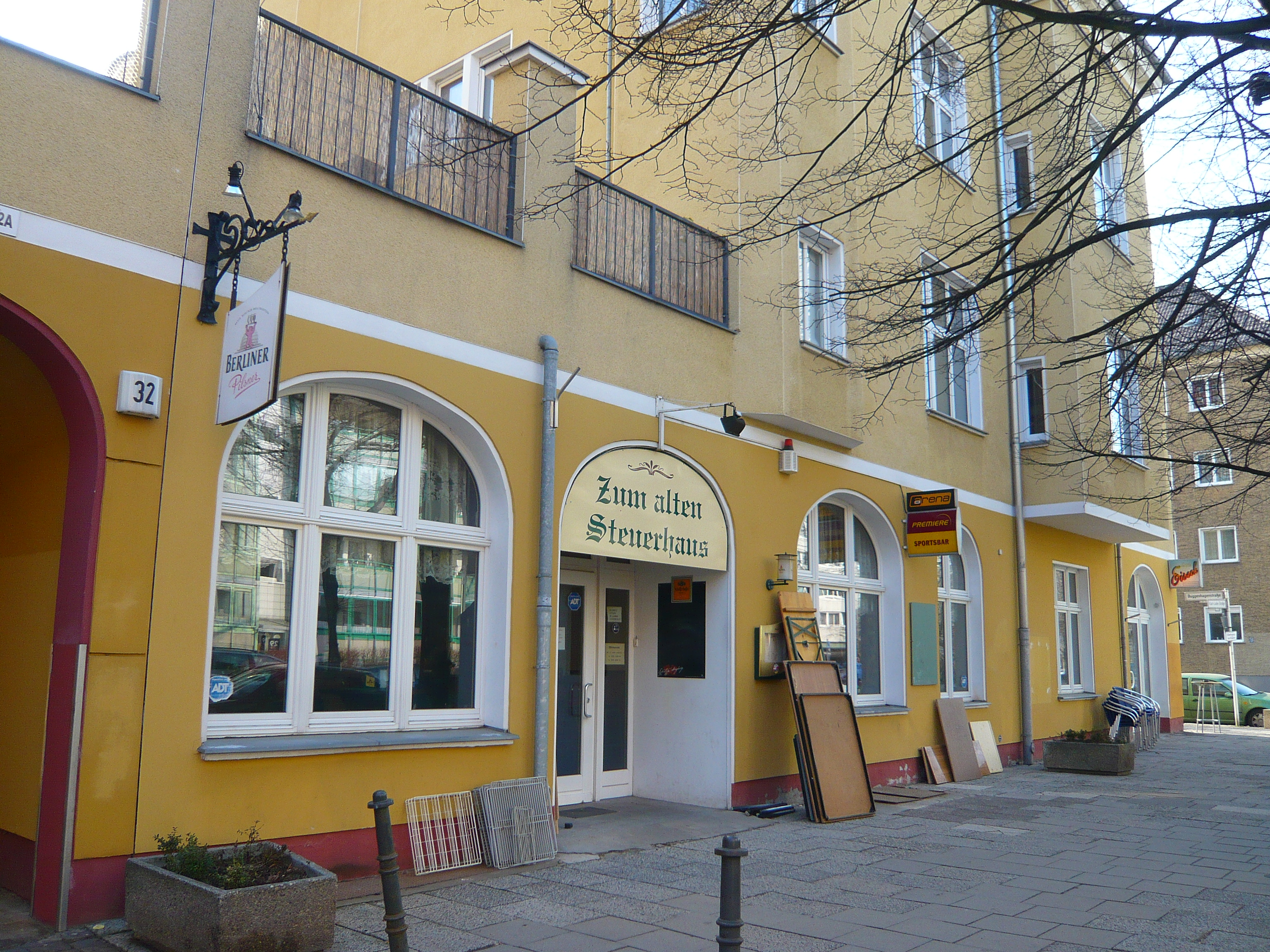 Fennpfuhl: Karl-Lade-Straße, Hinweis auf das früher benachbarte Steuerhaus